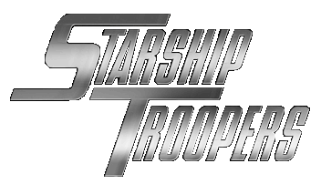 Logo von Starship Troopers